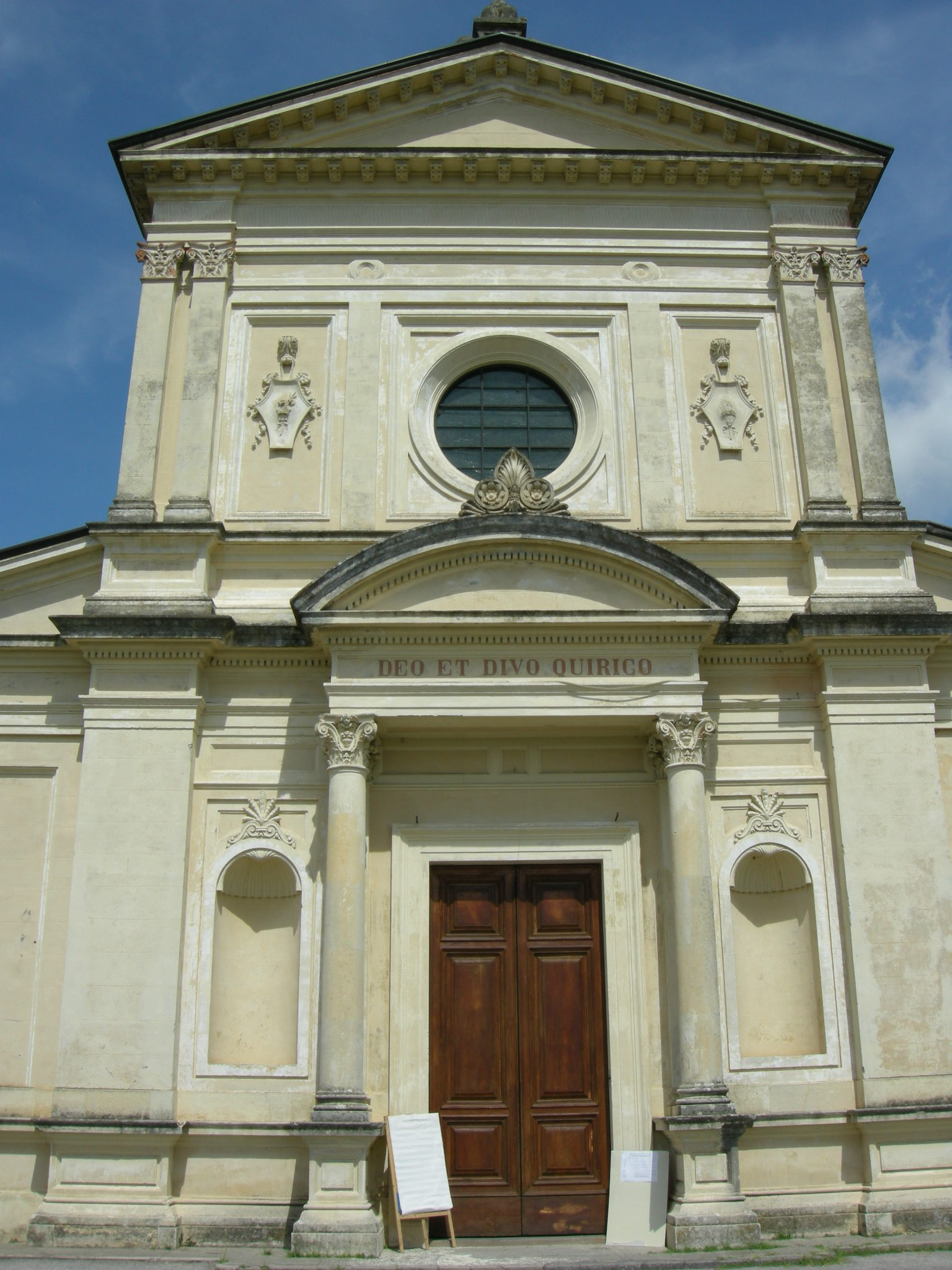 San quirico in monte san quirico 02 San quirico in monte san quirico 02